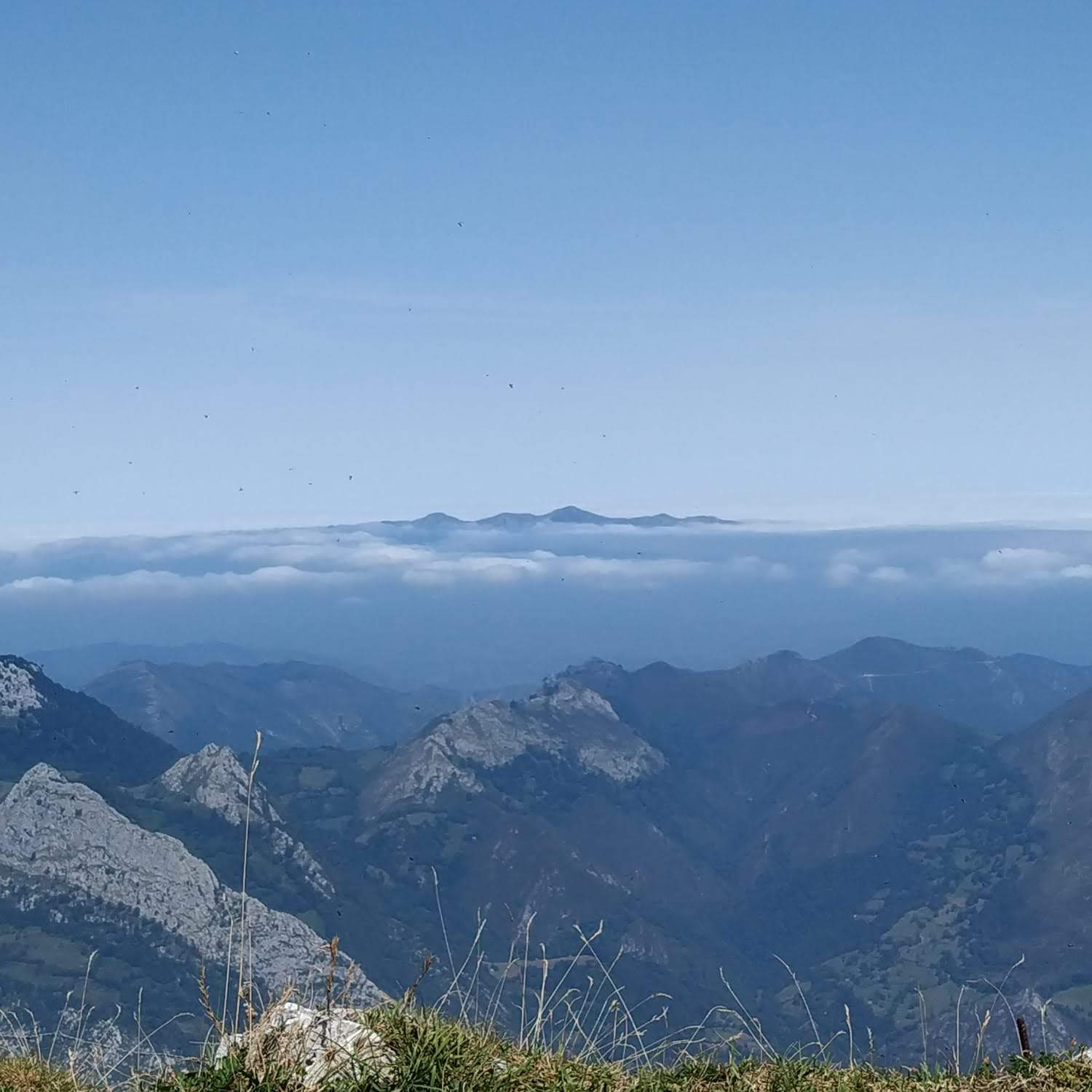 Vista del Pico Pienzu desde el Pico Pierzu (Ponga, Asturias).